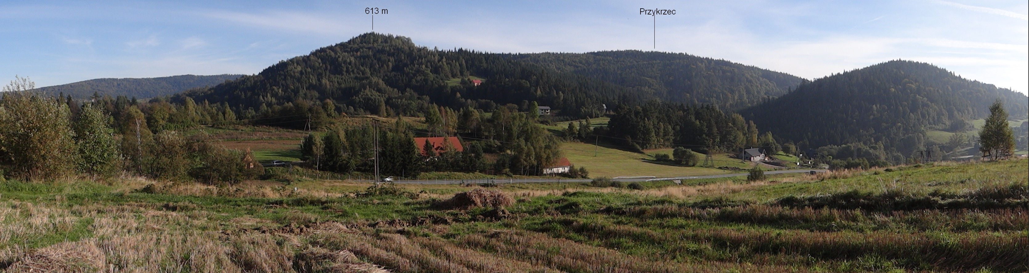 Widok od południowej strony na Przykrzec i inne wzniesienia Beskidu Makowskiego